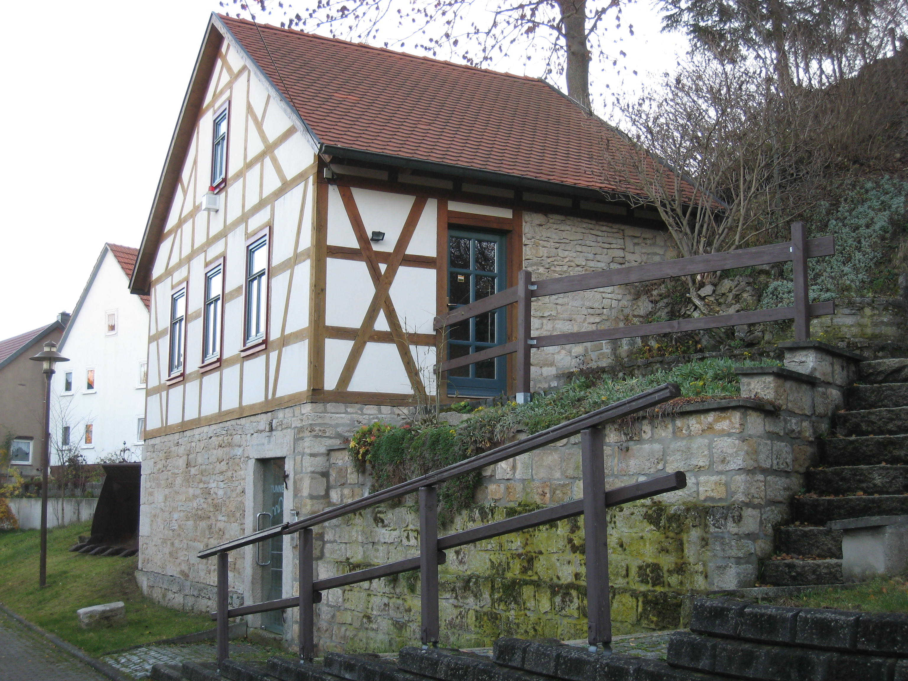 Tunela muzeo en Niederwillingen, Unterm Berge 6, Germanio